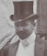 Architekt Robert Oerley